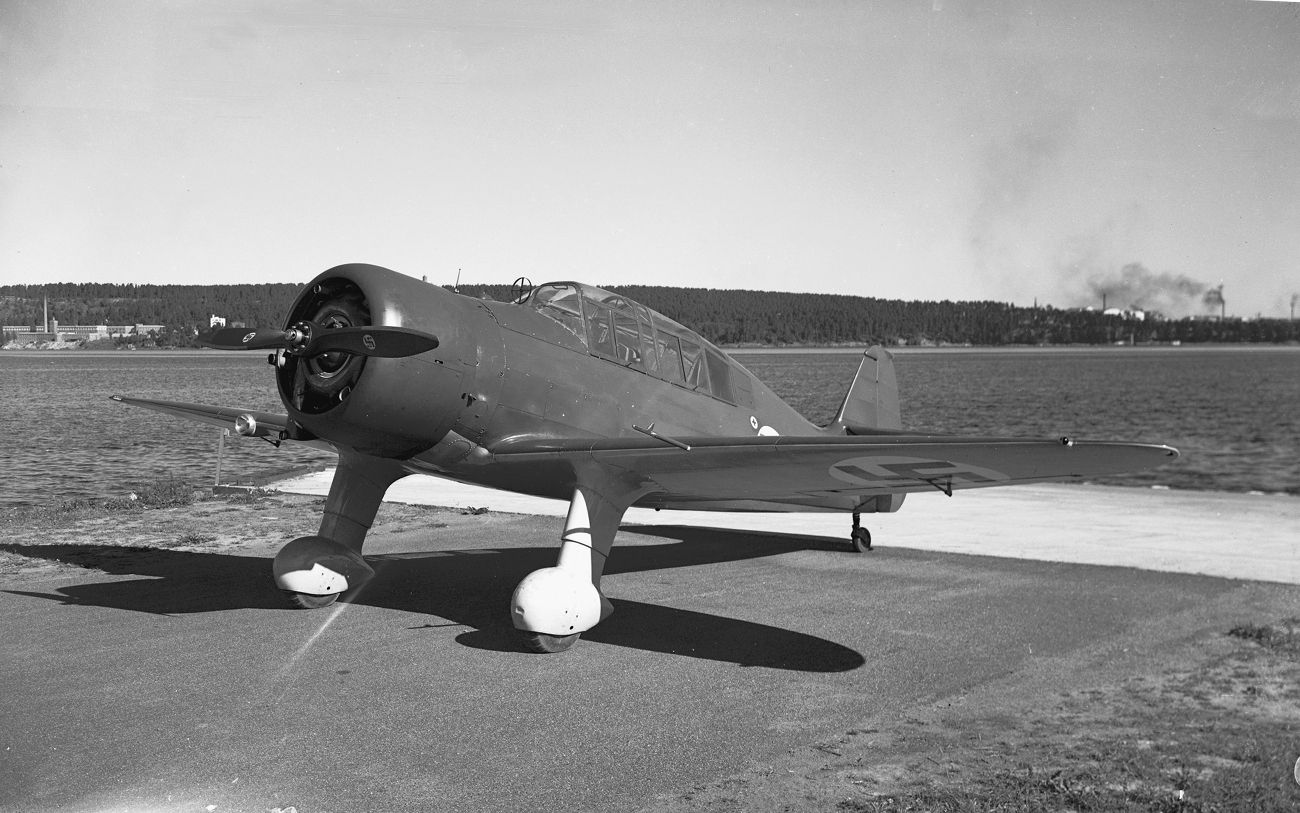 VL Pyry, Valtion lentokonetehtaalla suunniteltu ilmavoimien harjoitushävittäjä. Prototyypin PY-1 ensilennon suoritti Jorma Visapää Pyhäjärven jäällä 29.3.1939.